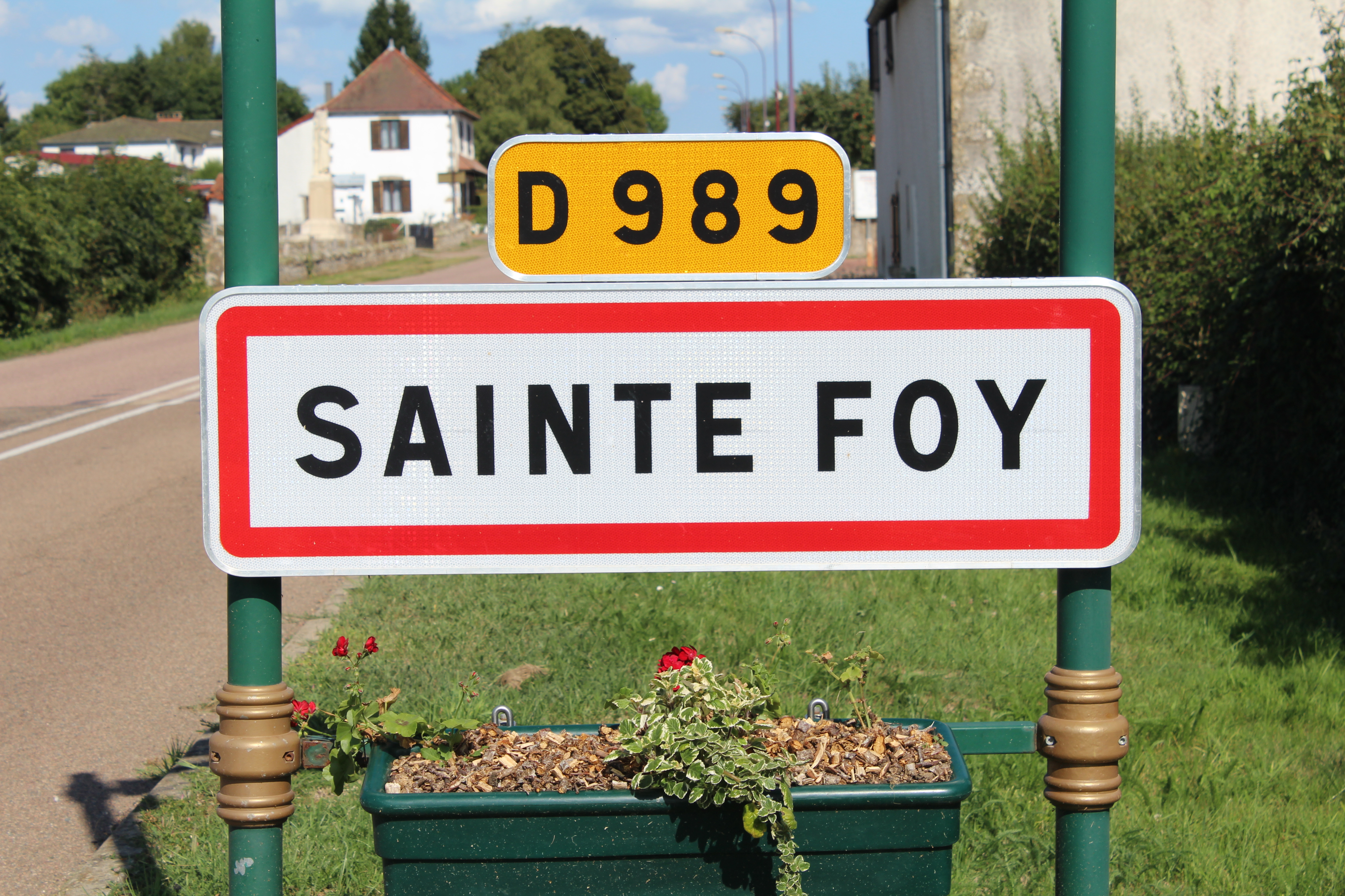 Panneau d'entrée dans Sainte-Foy, Saône-et-Loire.